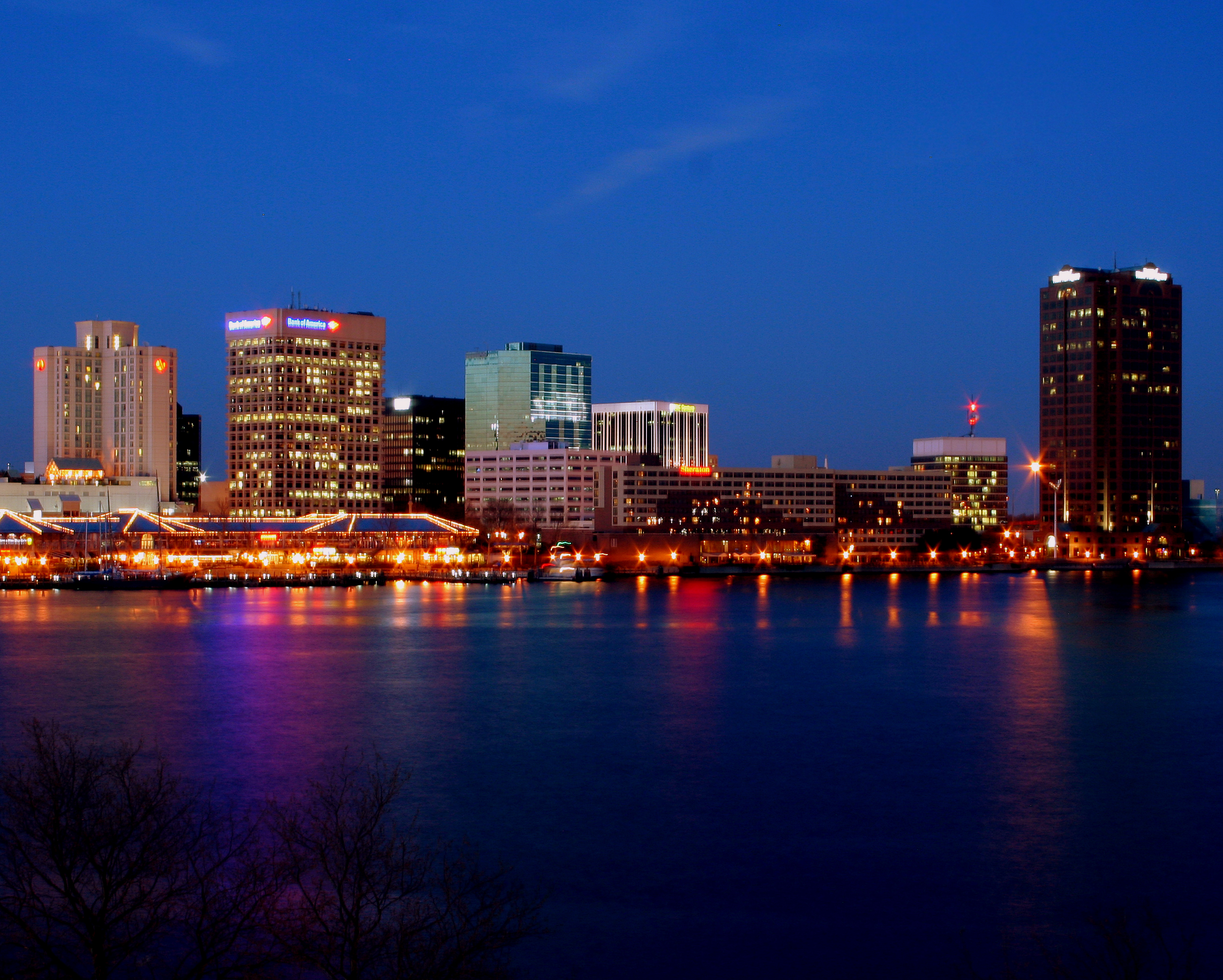 Norfolk, VA